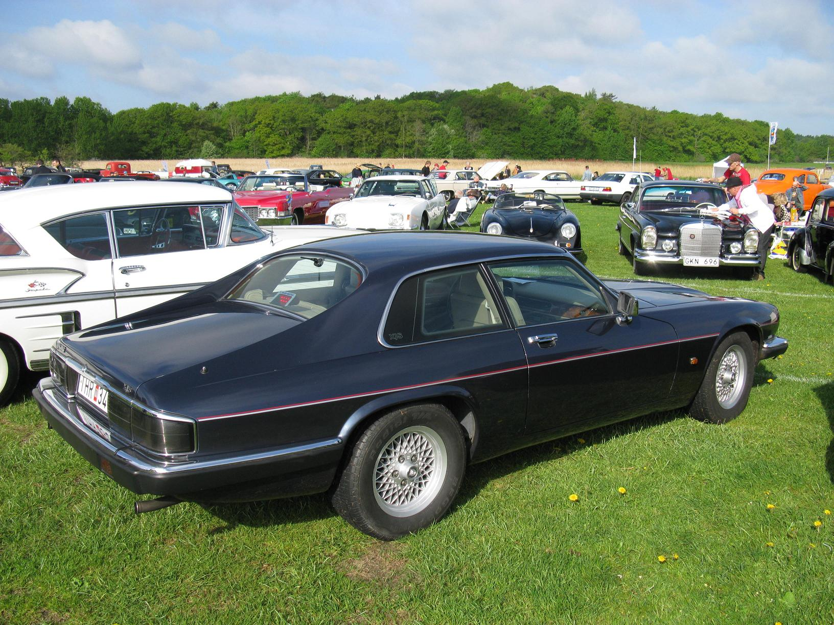 Jaguar XJ-S 4.0